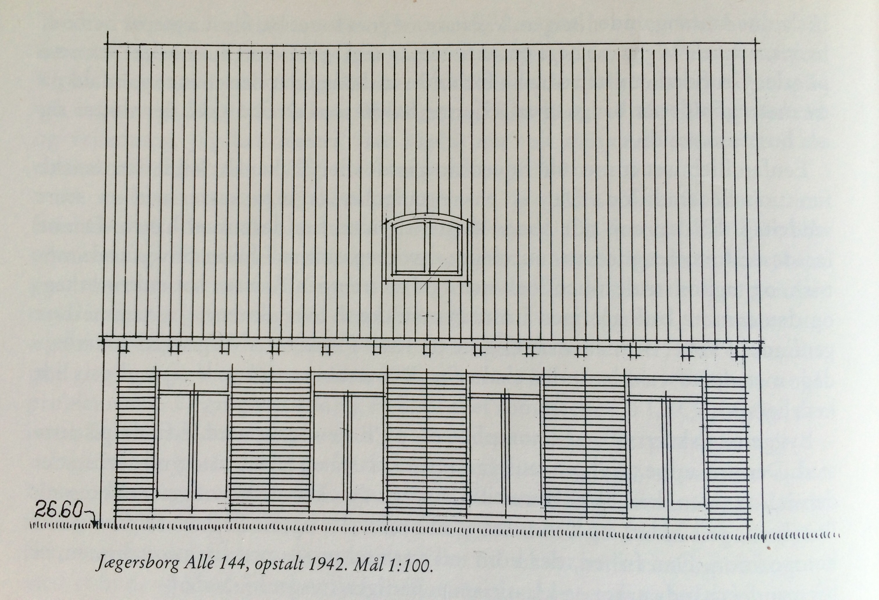 Enfamiliehus, Jægersborg Allé 144, Gentofte (1942)